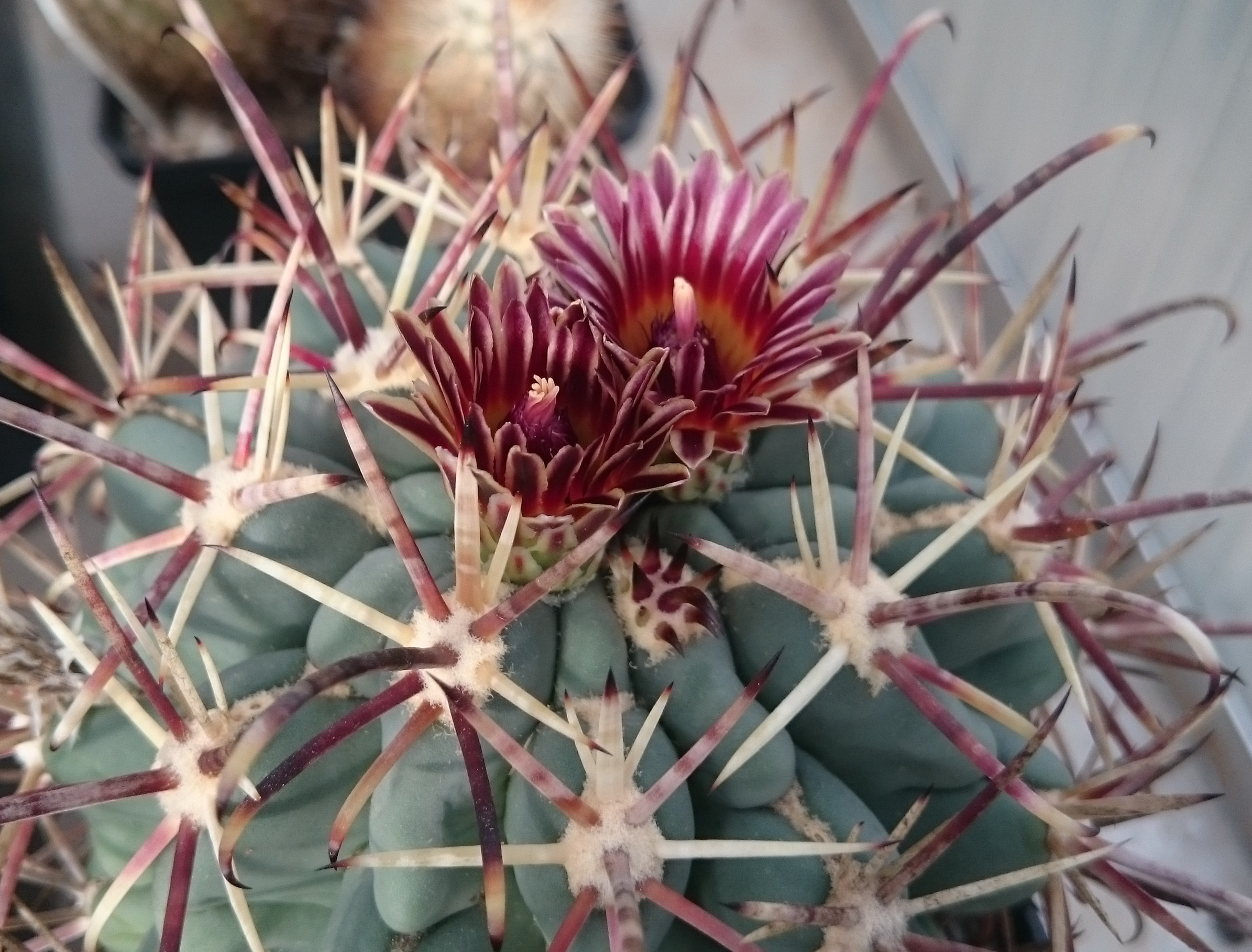 Glandulicactus mathssonii SB 1449